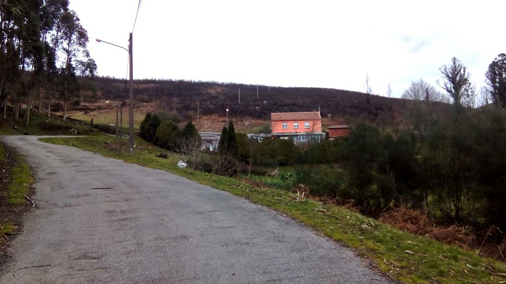 Vista da Espiñeira, Mandiá, Ferrol.